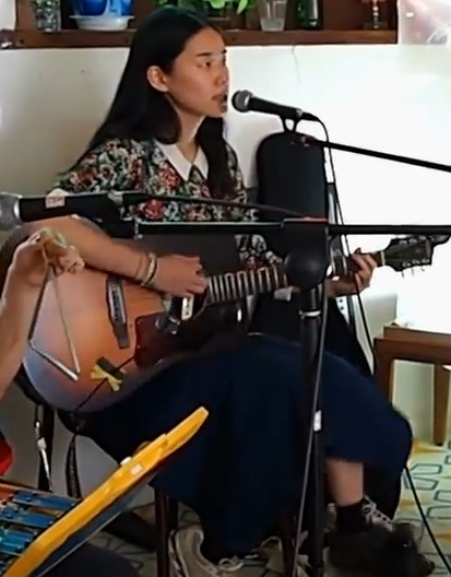 '내가 만약 신이라면'을 공연하는 대한민국의 싱어송라이터 이랑